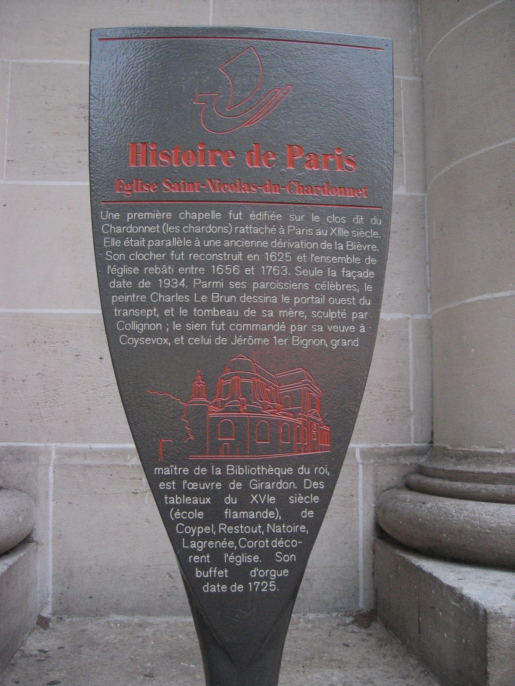 Panneau Histoire de Paris